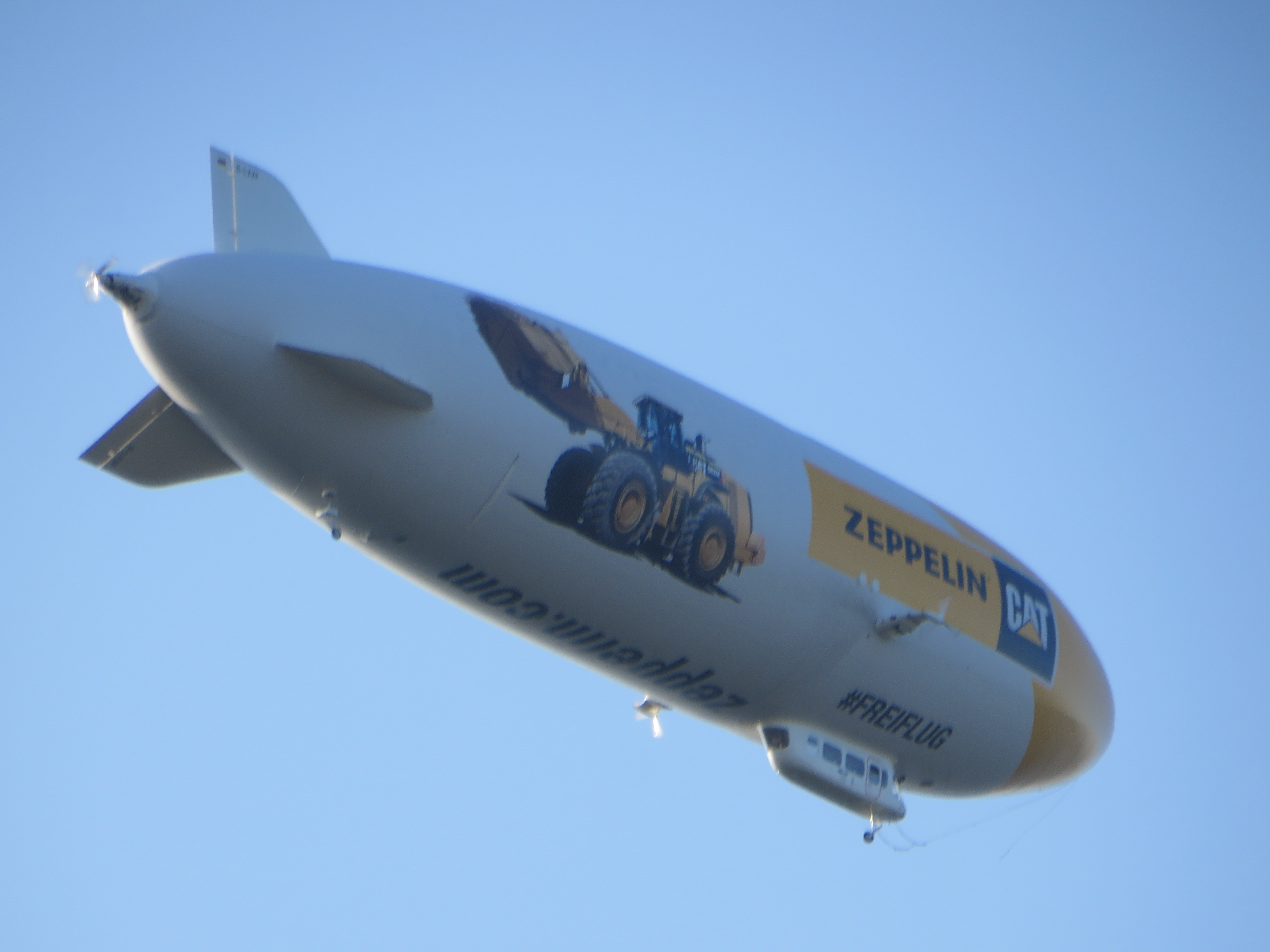 Zeppelin NT (Zeppelin CAT) von Flensburg-Schäferhaus kommend bei Glücksburg, 2017, Bild 02